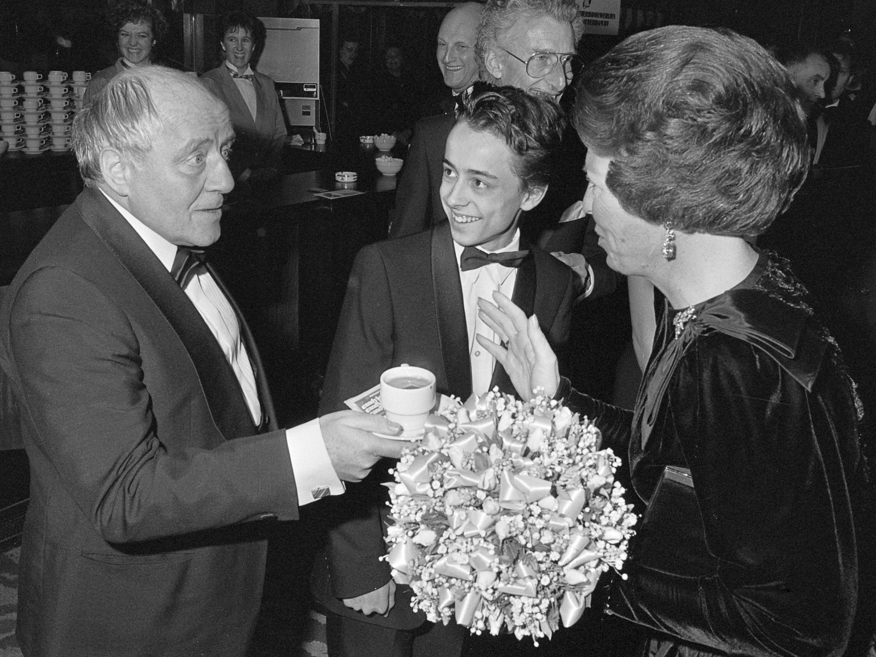 Koningin Beatrix krijgt koffie van John Kraaykamp sr. na premiere film "De Aanslag"; Marc van Uchelen 5 februari 1986